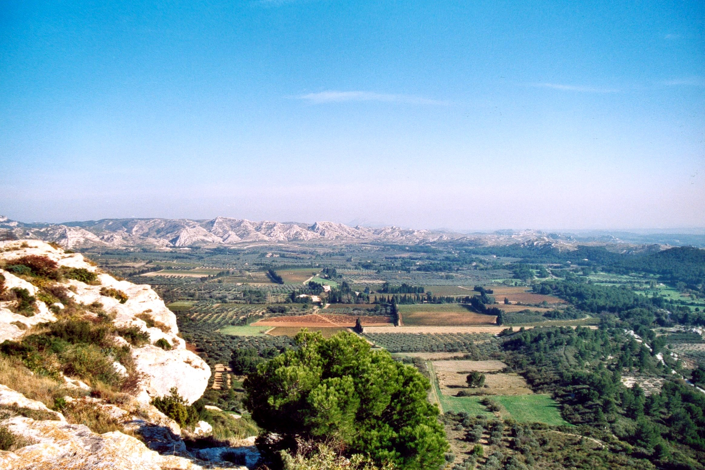 Les Baux-de-Provence Bouche du Rhône France Vue depuis le château Photographie prise par Patrick GIRAUD